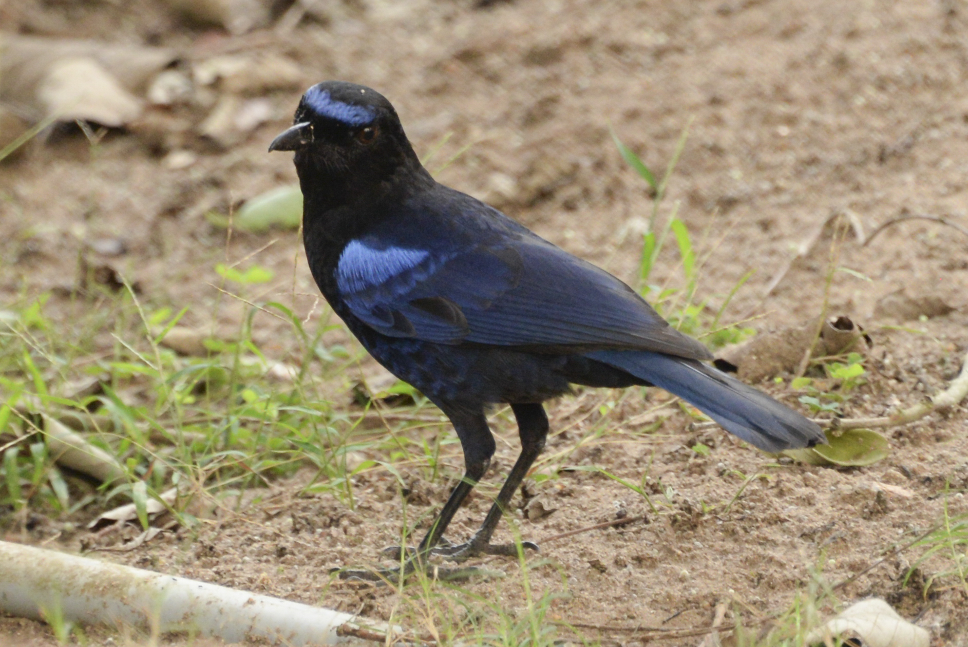 காட்டு பறவை